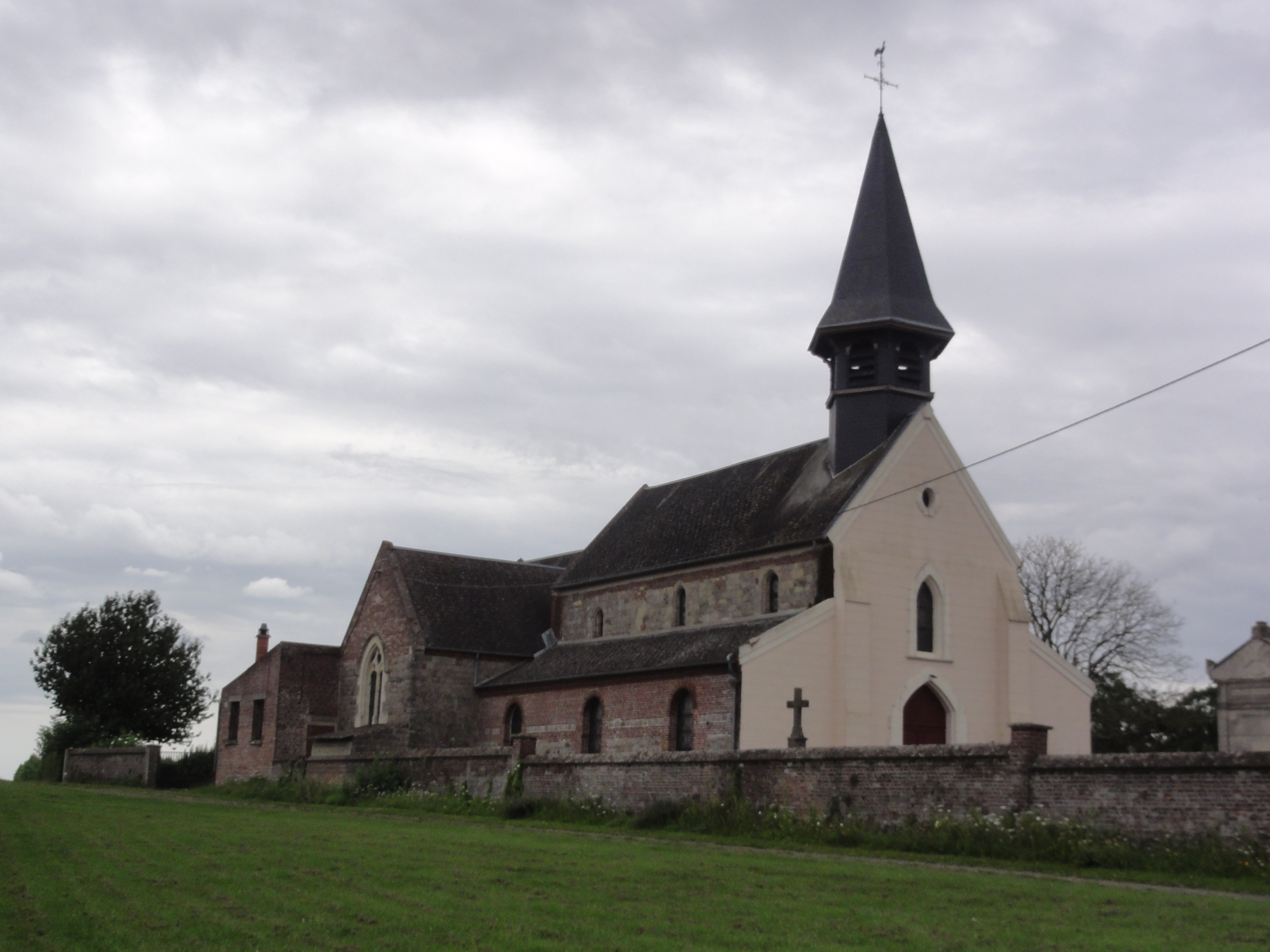 Villeselve (Oise) église